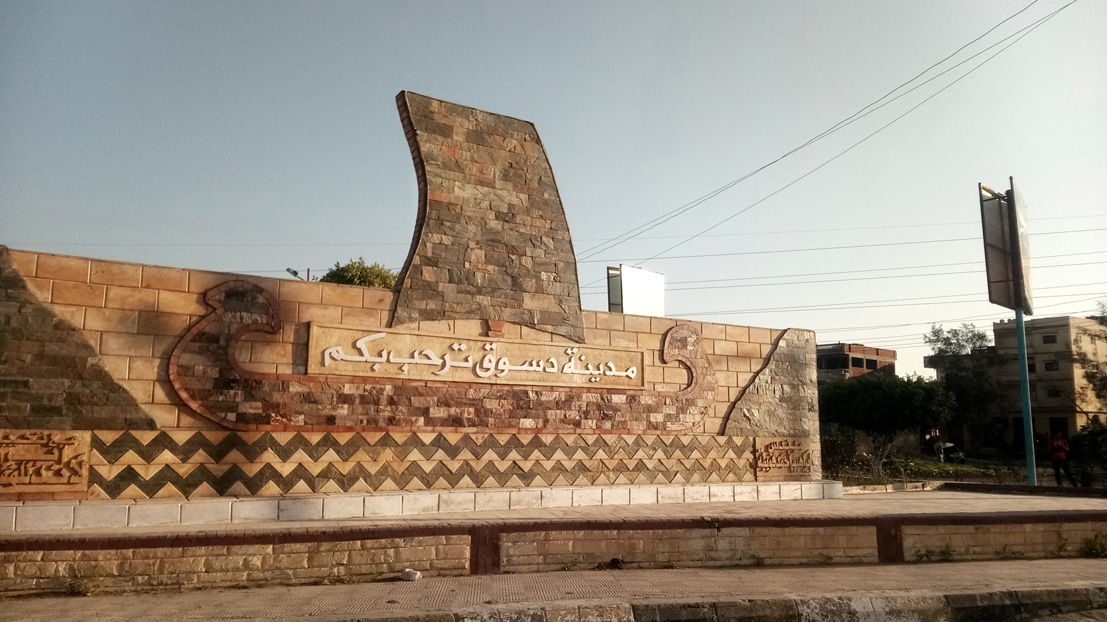 جدارية حجرية كُتب عليها "مدينة دسوق ترحب بكم".